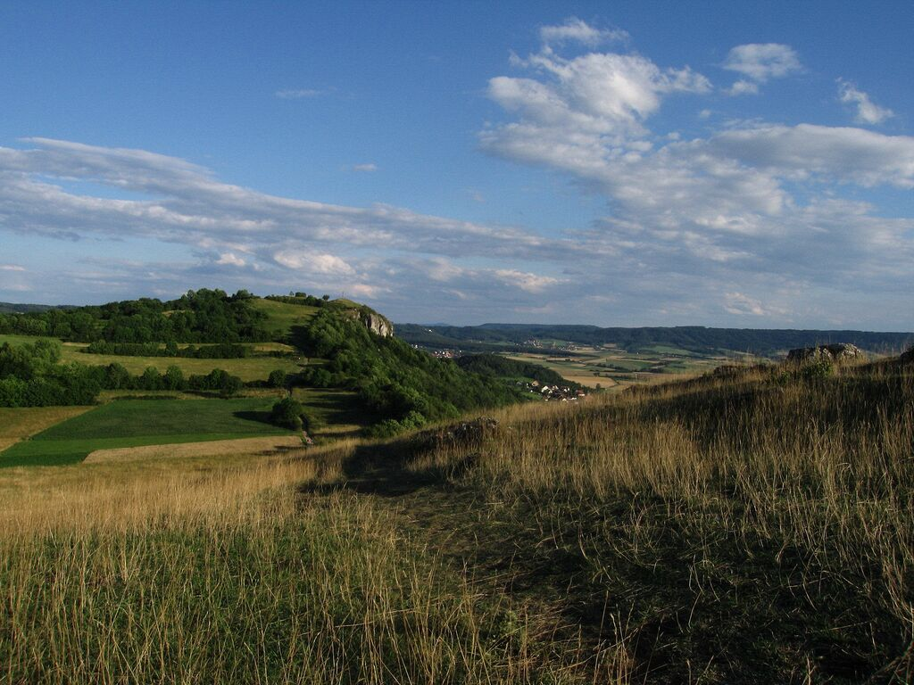 Walberla, Blick vom Walberla zum Rodenstein